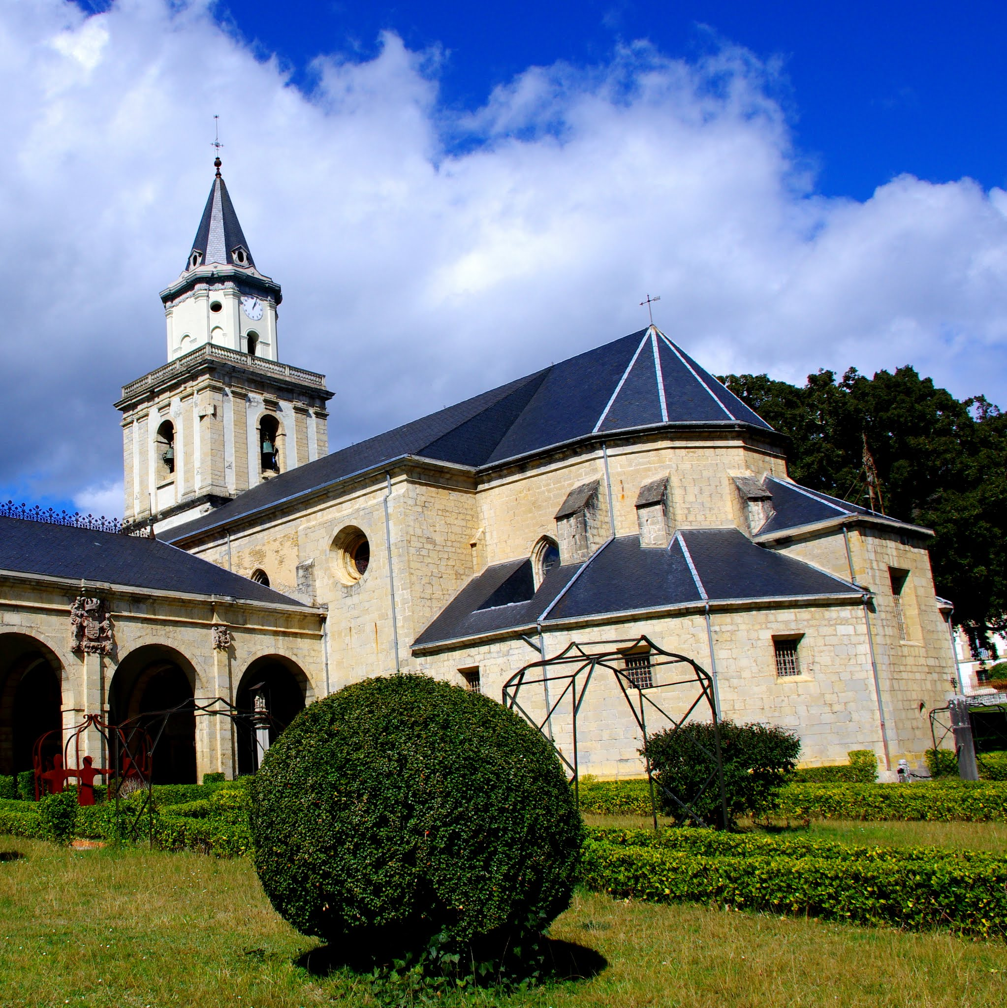 Nuestro Señora de la Encina